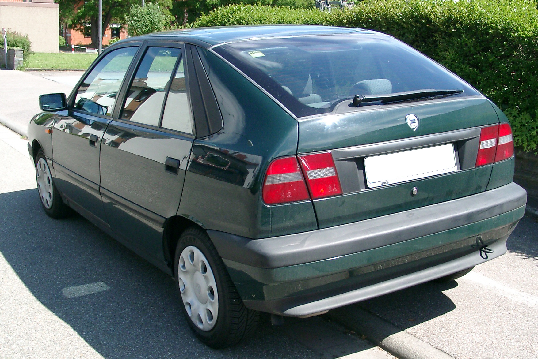 Lancia Delta, 2. Generation